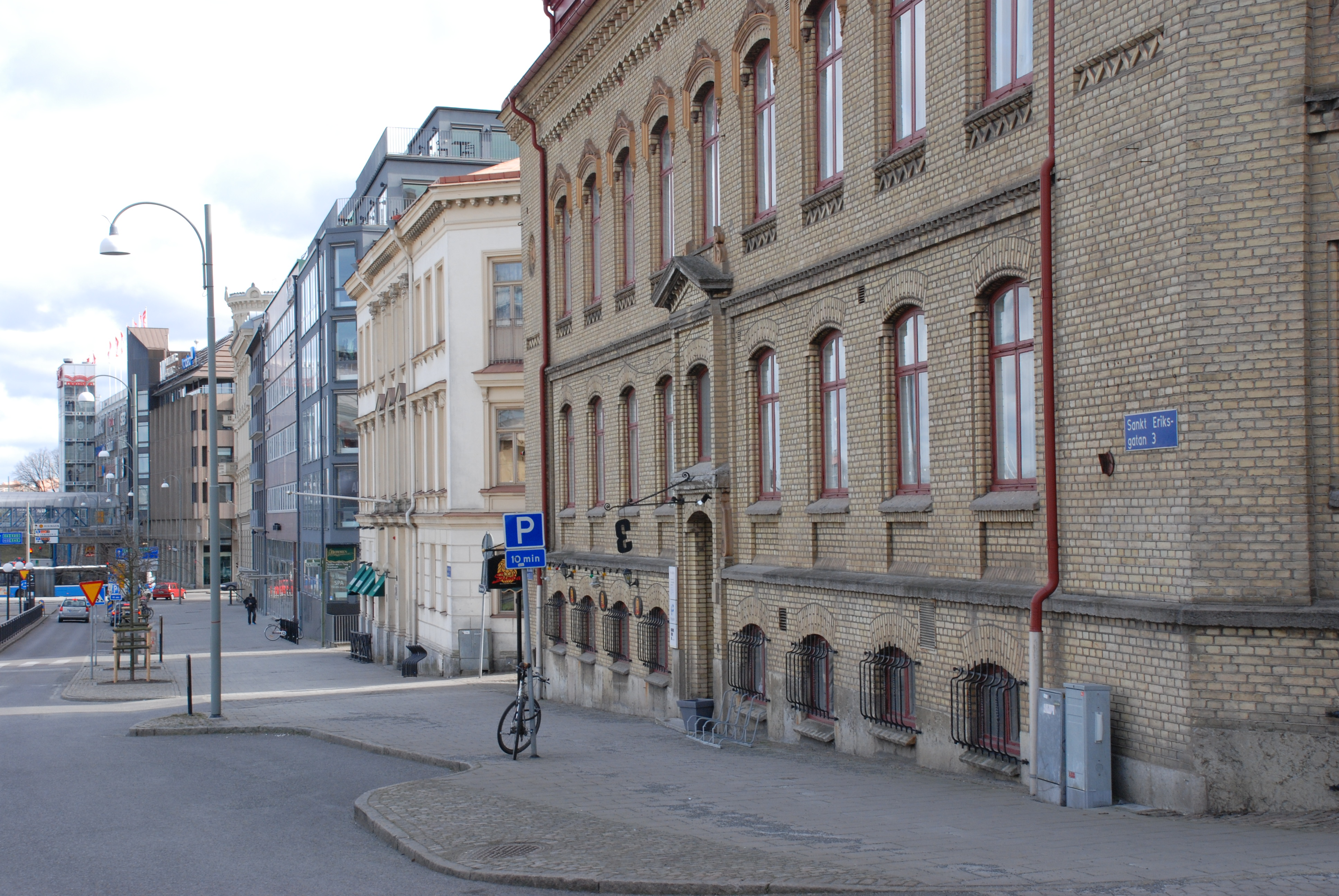 Sankt Eriksgatan i Göteborg i riktning mot Nordstan från hörnet med Mätaregatan.